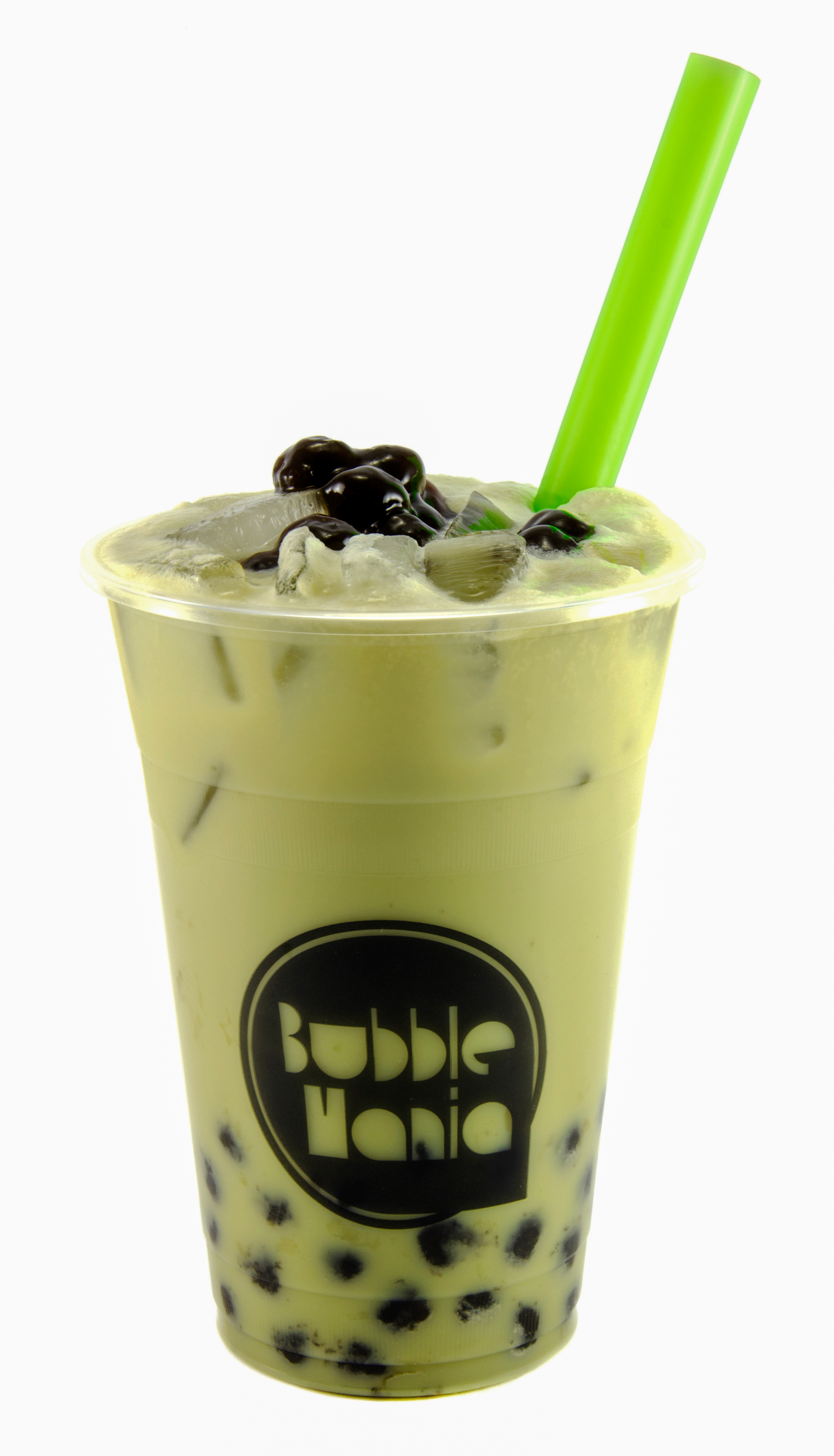 Matcha green tea